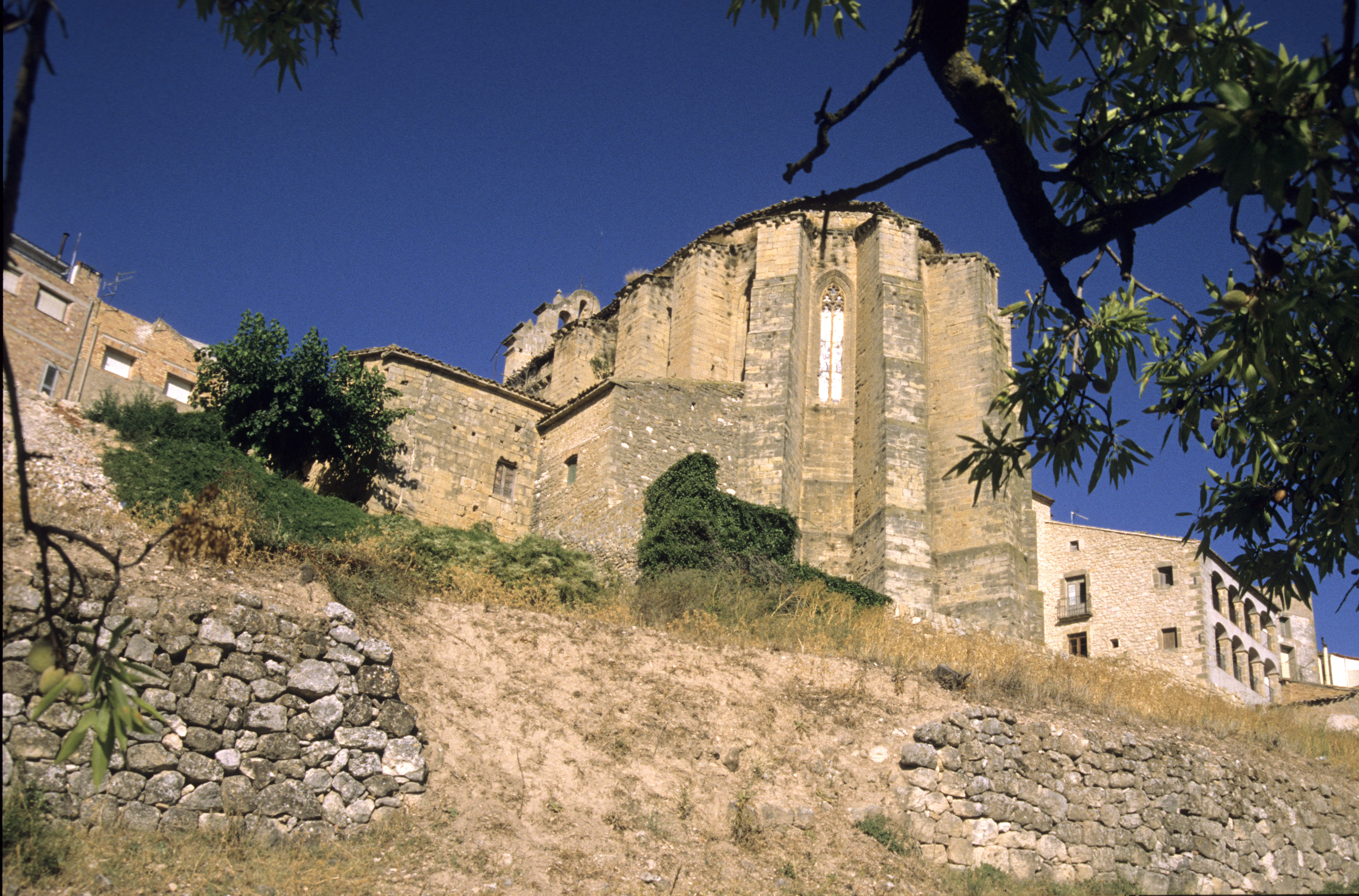 Horta de Sant Joan (Terra Alta). Església parroquial. Vista de la capçalera.